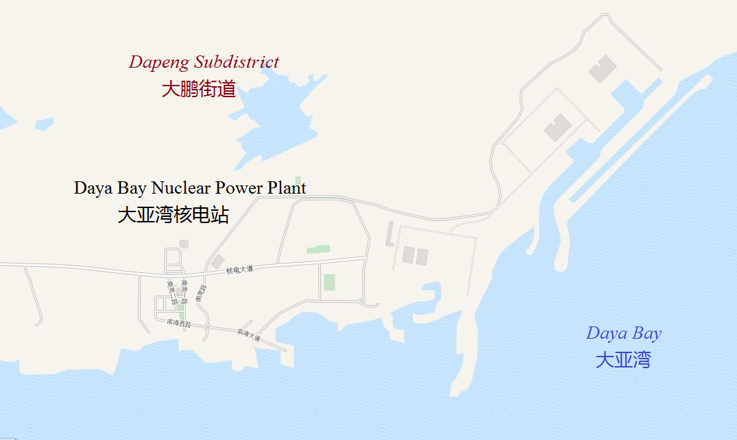 Geografie van dit gebied via